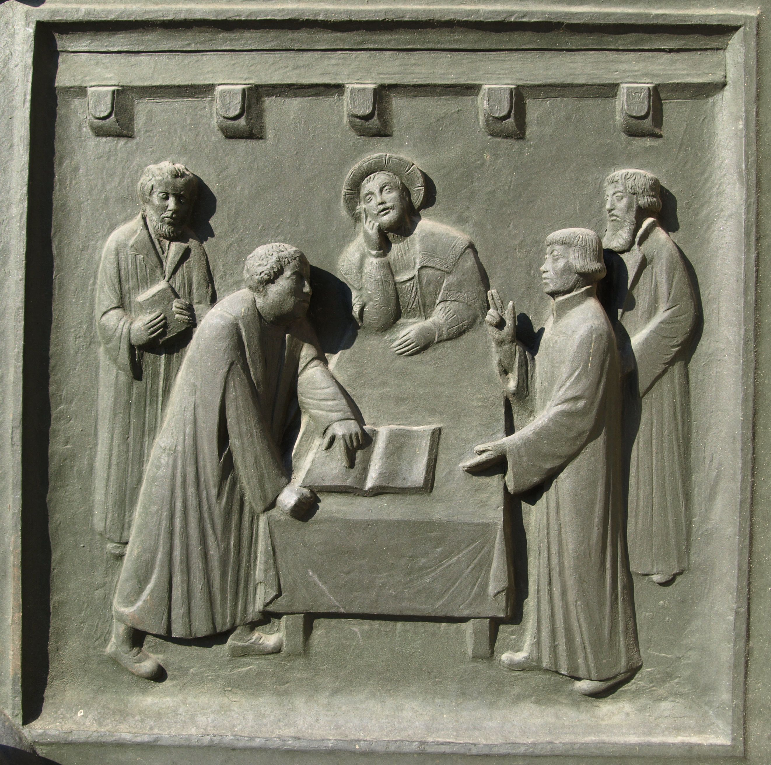 Zwingli und Luther diskutieren in Marburg über das Abendmahl. Abbildung von der Zwinglitür der Kirche Großmünster in Zürich. Abgebildete Personen: Melanchton, Luther, Landgraf Philipp von Hessen, Zwingli, Oekolampad